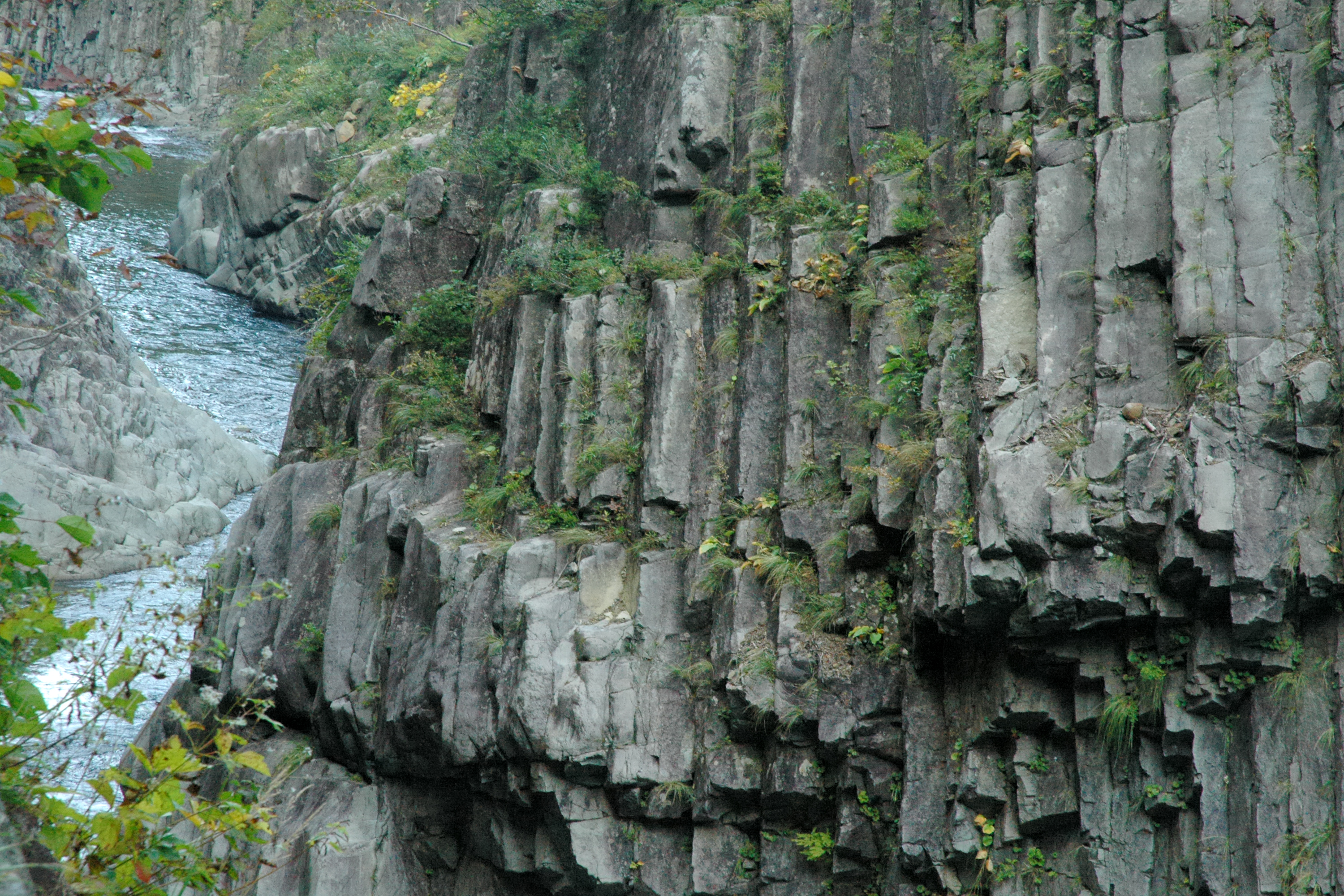 Kiyotsukyo, Japan. (清津峡)